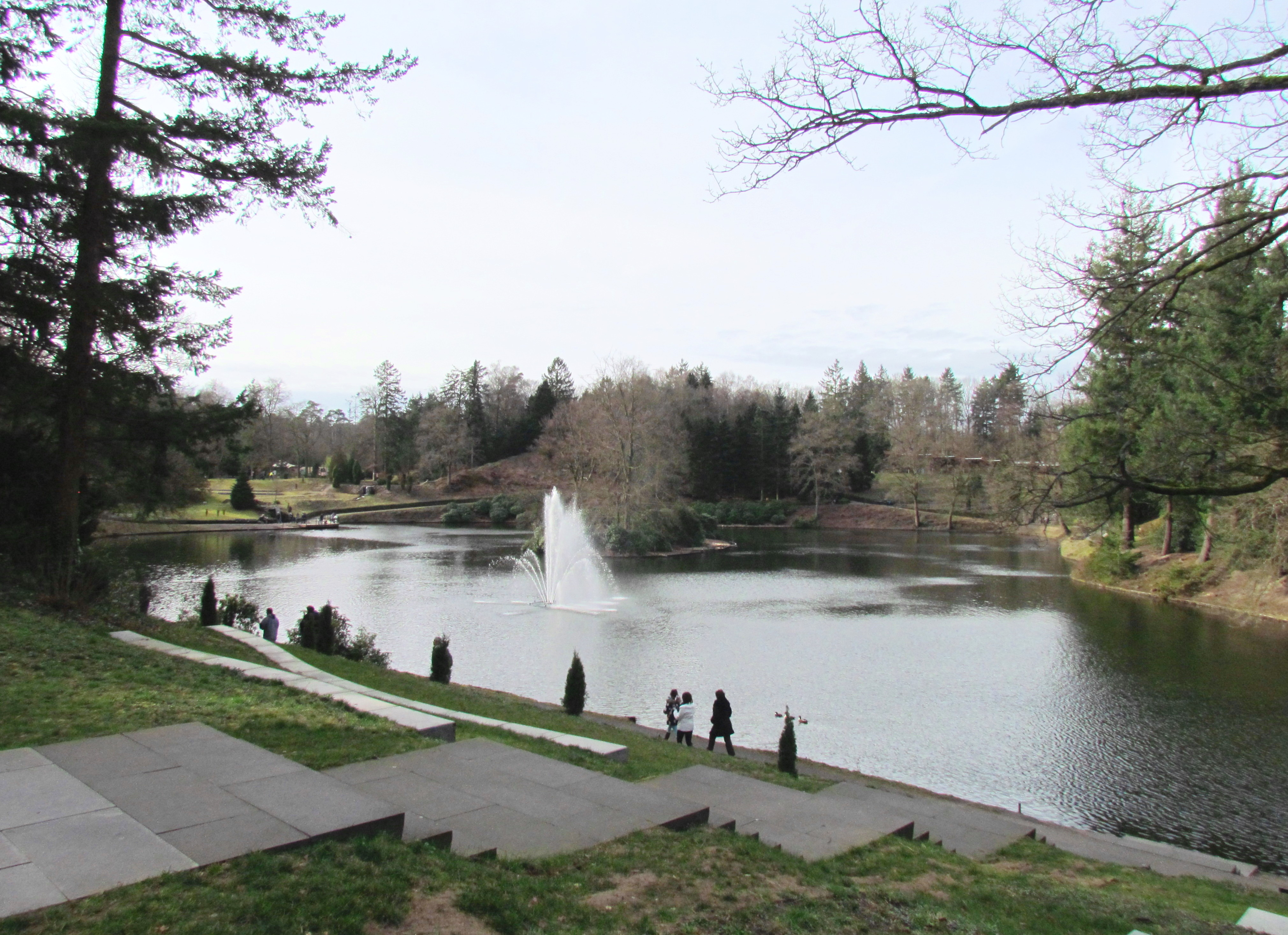 De vijver van Natuurpark Berg & Bos in Apeldoorn (NL)